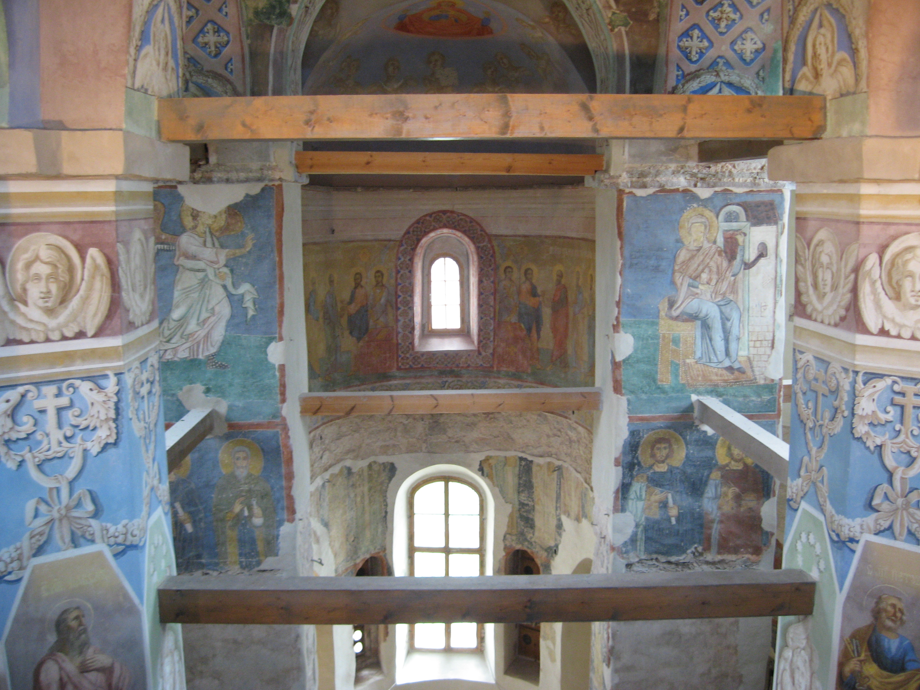 Интерьер собора Антониева монастыря в Новгороде. Вид с хор.